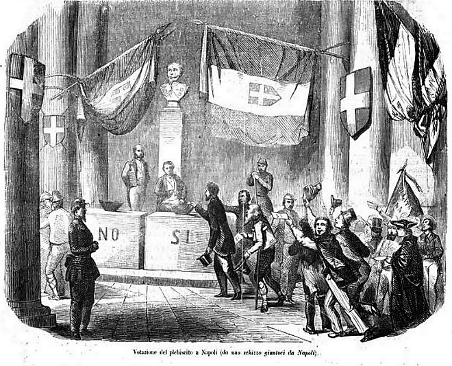 Votazione del plebiscito a Napoli (da uno schizzo giuntoci da Napoli)